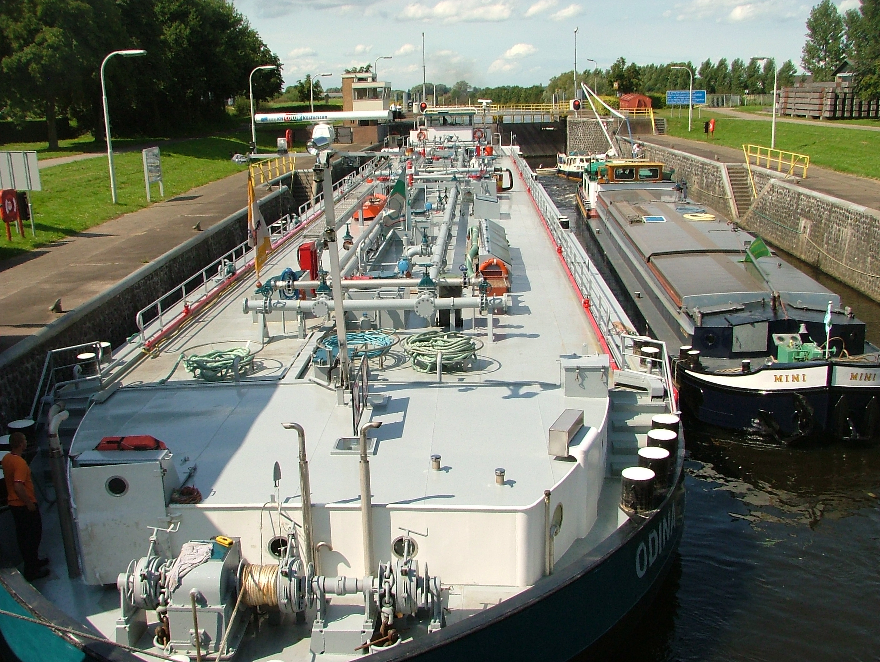 De verlengde dubbelwandige tanker ODINA, ENI nummer 04011680, en de MINI, ENI nummer 03051536, in de Skuis Engelen